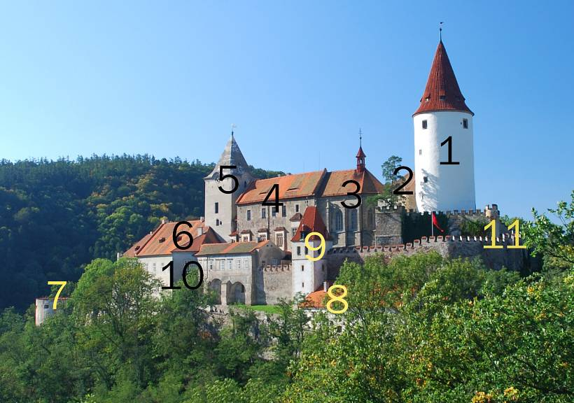 Fotografie hradu Křivoklát s číslovaným popisem: 1 - Velká věž - donjon, 2 - Severní křídlo, 3 - Kaple Panny Marie, 4 - Jižní křídlo s rytířským sálem, 5 - Prochoditá věž s hodinami, 6 - Hejtmanství, 7 - Zlatá bašta, 8 - Pokladna, kdysi četnická stanice, 9 - Malá věž, 10 - Hlavní brána, 11 - Ochozy